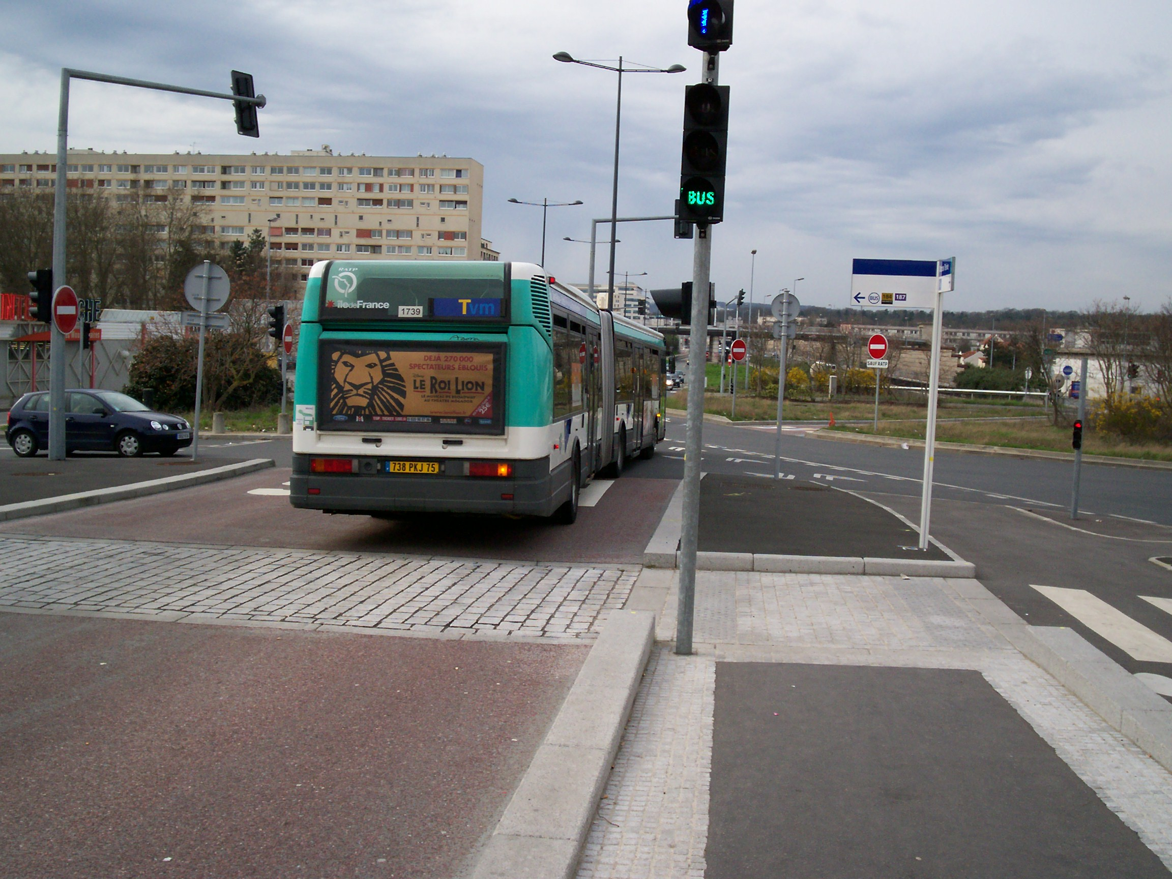 Bus TVM venant juste de quitter l'arrêt Docteur Ténine en direction de La Croix de Berny RER, et feux de priorité bus